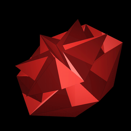 Perspectiva de un IsoAxis®